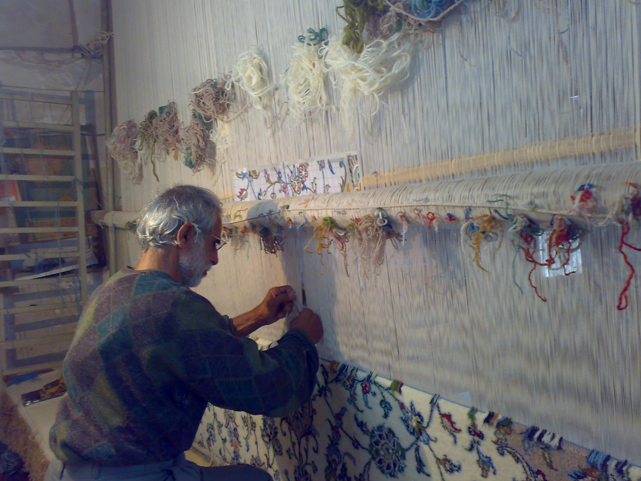 قالی بافی علیرضا کرباسی آران وبیدگل محله مسجد قاضی ملاعلی آرانی